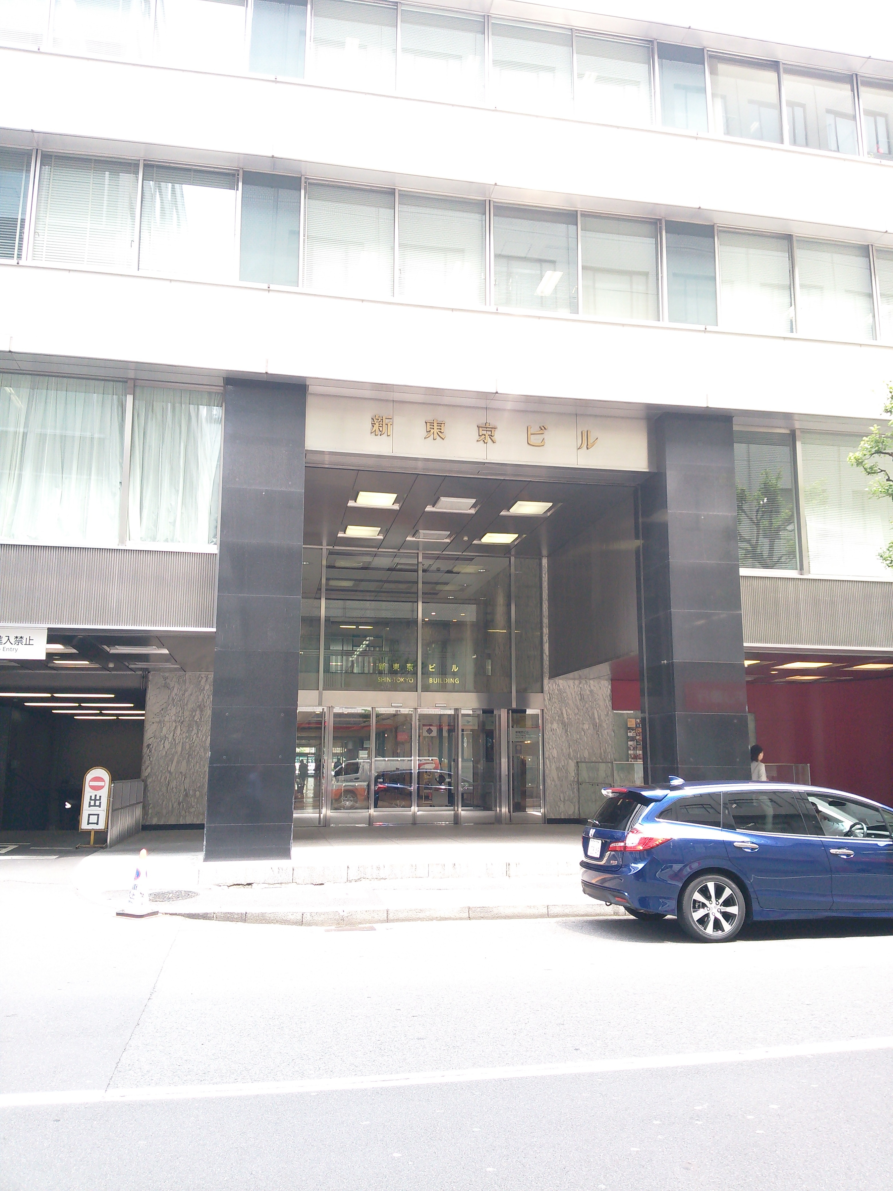 東京・丸の内、新東京ビルヂングのエントランス